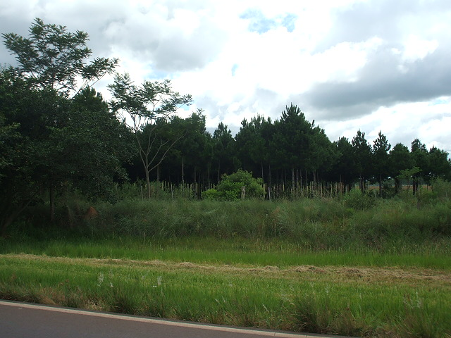 bosque